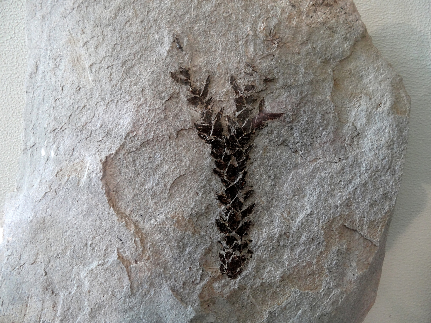 Koniferenblatt Pagiophyllum kurri aus dem Schwarzen Jura der Fränkische Alb; Fundort nahe Bad Staffelstein /Oberfranken; Exponat in der Petrefaktensammlung Kloster Banz